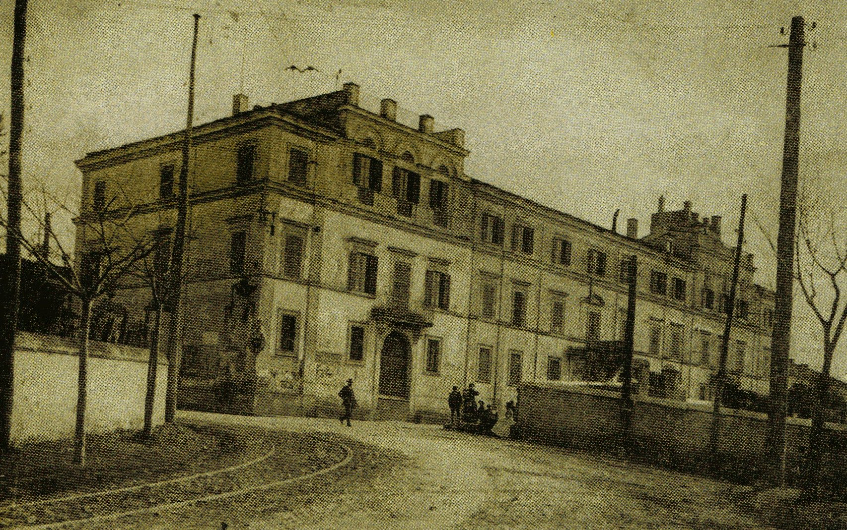 Palazzo Santovetti a Grottaferrata (RM)